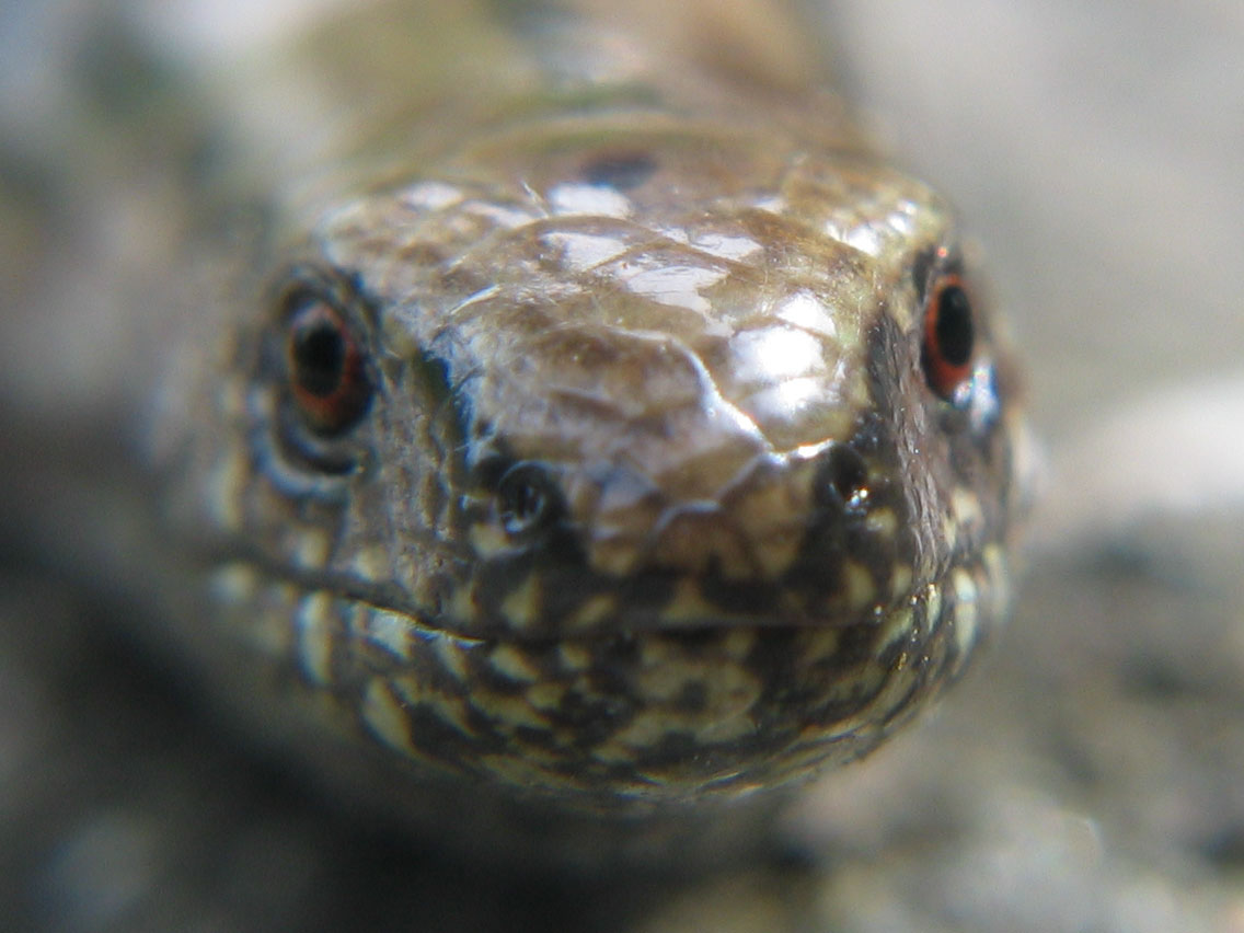 Slowworm, photo taken in Sweden